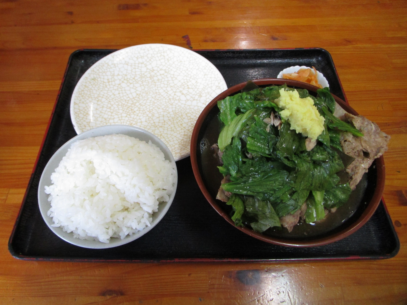 骨汁（沖縄県中頭郡北谷町、食事処 がじまるにて撮影）